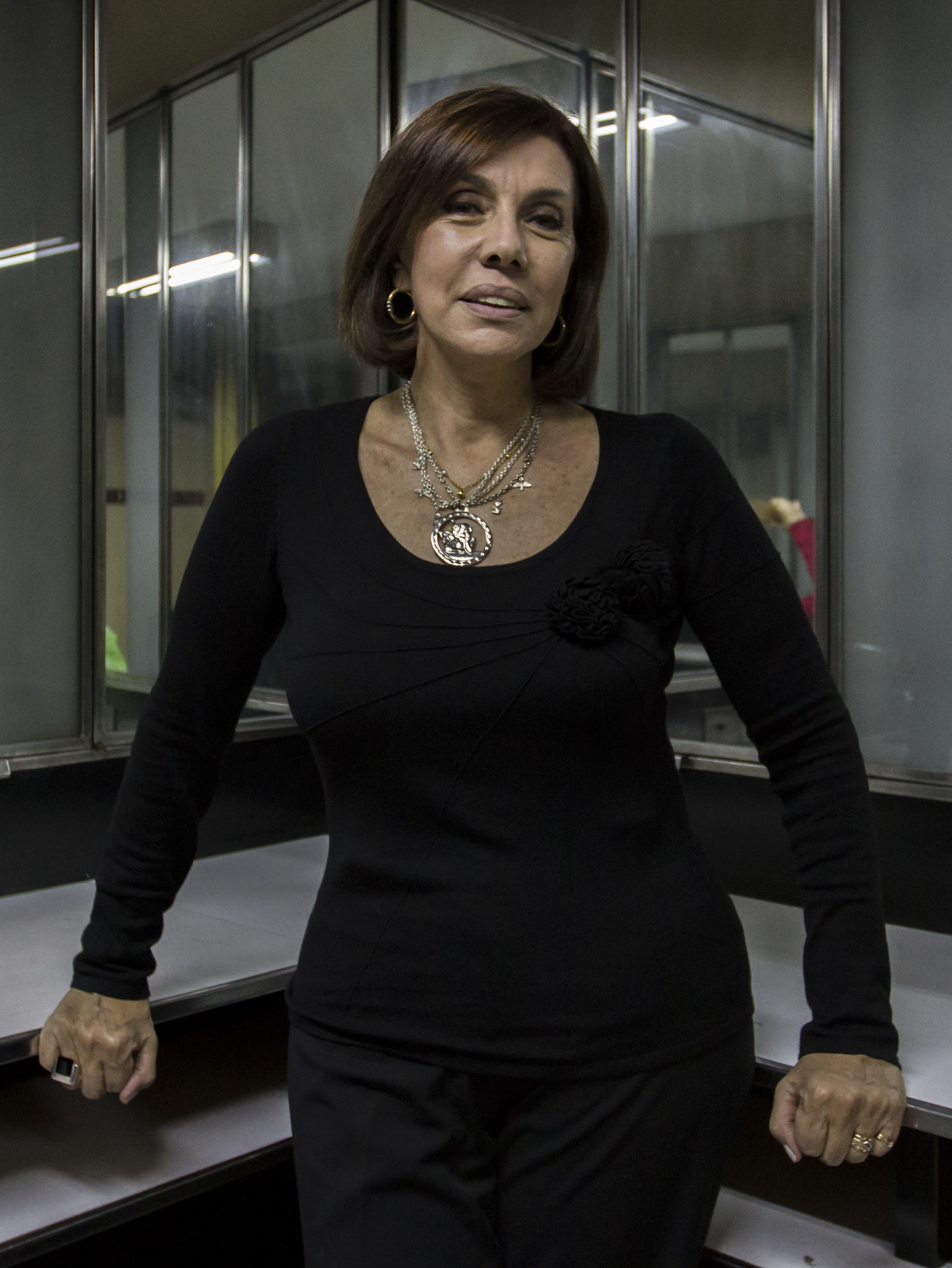 Buenos Aires, 24 de mayo de 2016 - En homenaje al Teatro Abierto, se presentó la obra "Hay que apagar el fuego" del ciclo "Radioteatro en el Cervantes" . La obra estuvo protagonizada por Horacio Peña, Nora Cárpena y Mario Pasik. En los relatos estuvo Luciana Ulrich y contó con la dirección de Julio Baccaro. Fotos: Romina Santarelli / Ministerio de Cultura de la Nación.